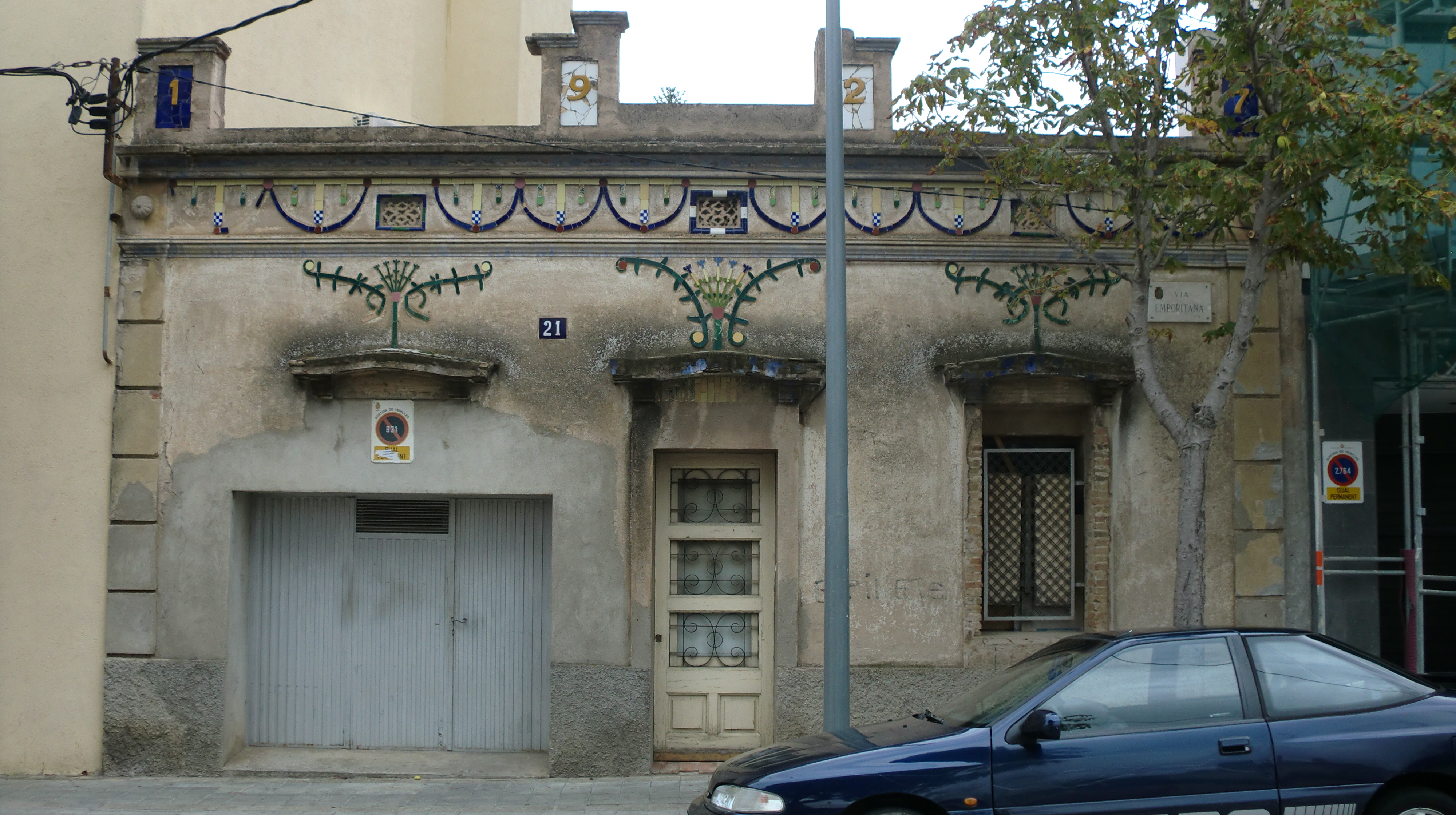 Habitatge a la via Emporitana, 21 (Figueres)